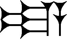 Cuneiform sign